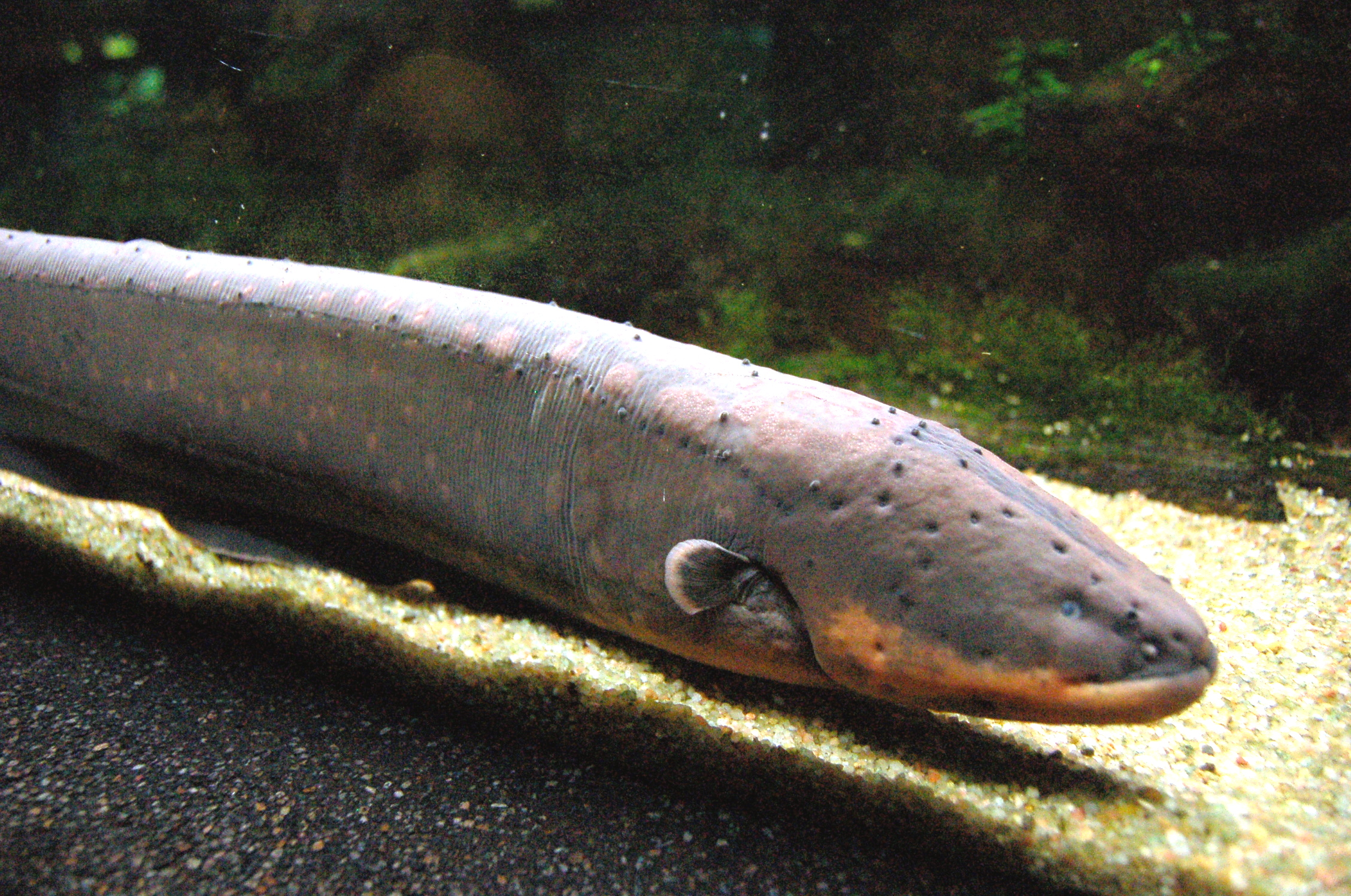 Electrophorus electricus Aquarium tropical du Palais de la Porte Dorée. Paris. France.